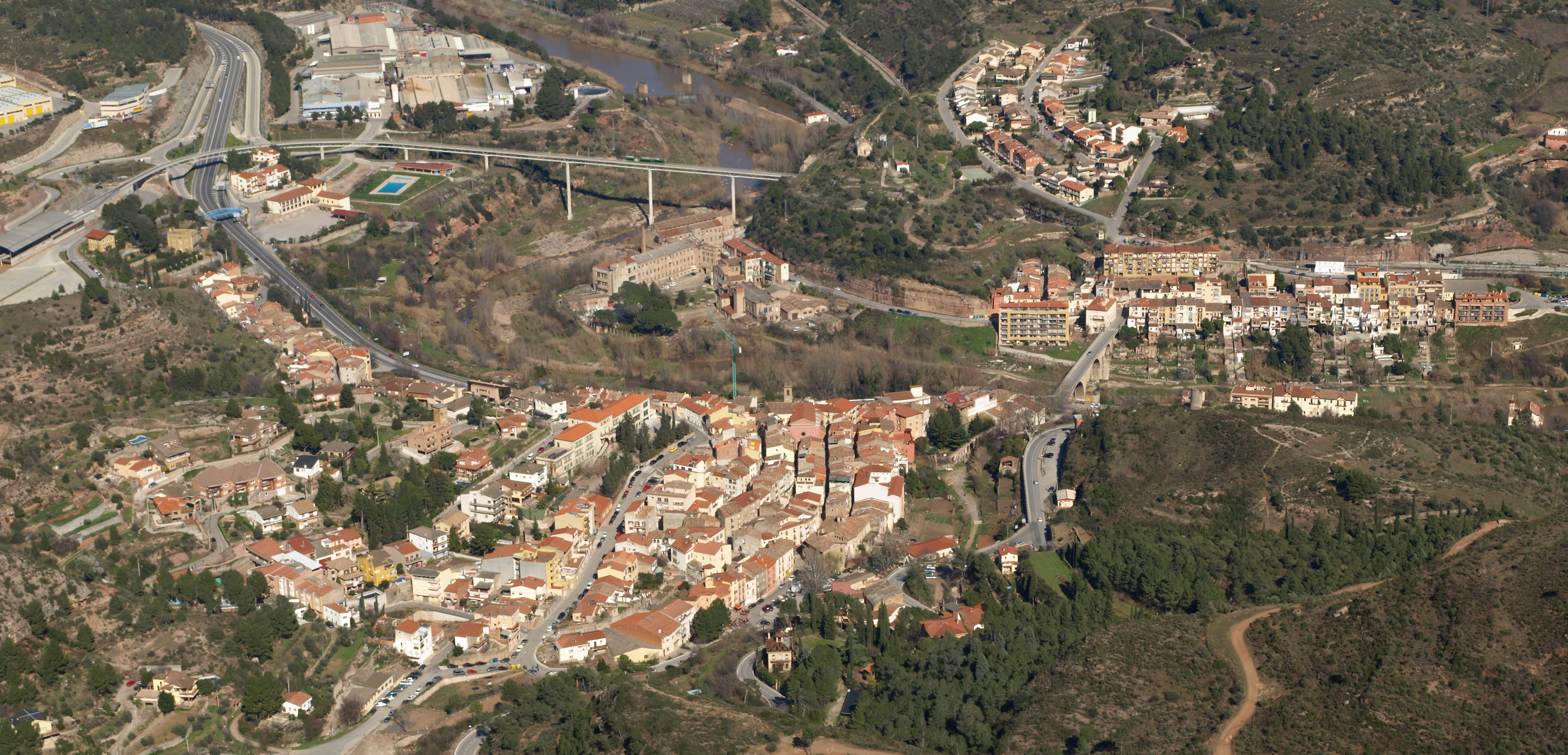 Vista panorámica de la localidad de Monistrol de Montserrat (Cataluña, España).